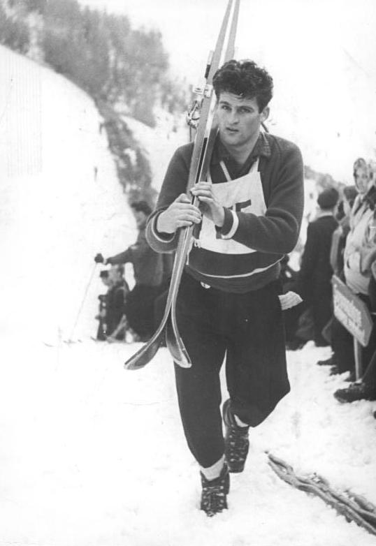 Zentralbild Schlegel 4.4.56 Oster-Skispringen in Oberwiesenthal Am Ostersonntag fand in Oberwiesenthal ein Spezial-Sprunglauf um den Pokal der "Volksstimme" statt. Sieger in der Gesamtnote von 232,8 wurde Harry Glass vor dem Pokalverteidiger Werner Lesser und Helmut Recknagel. UBz: Helmut Recknagel steigt zum Schanzentisch empor."